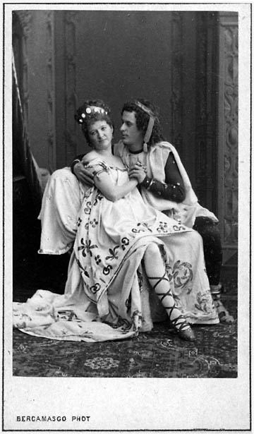 "Прекрасная Елена". Александринский театр. Вера Лядова - Елена, Николай Сазонов - Парис.